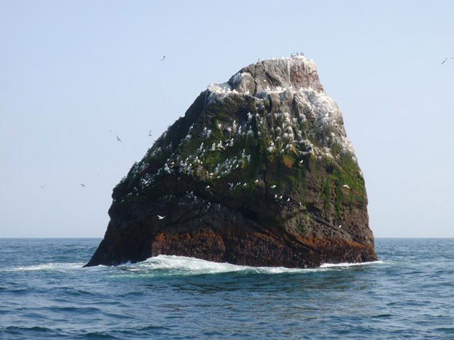 Rockall